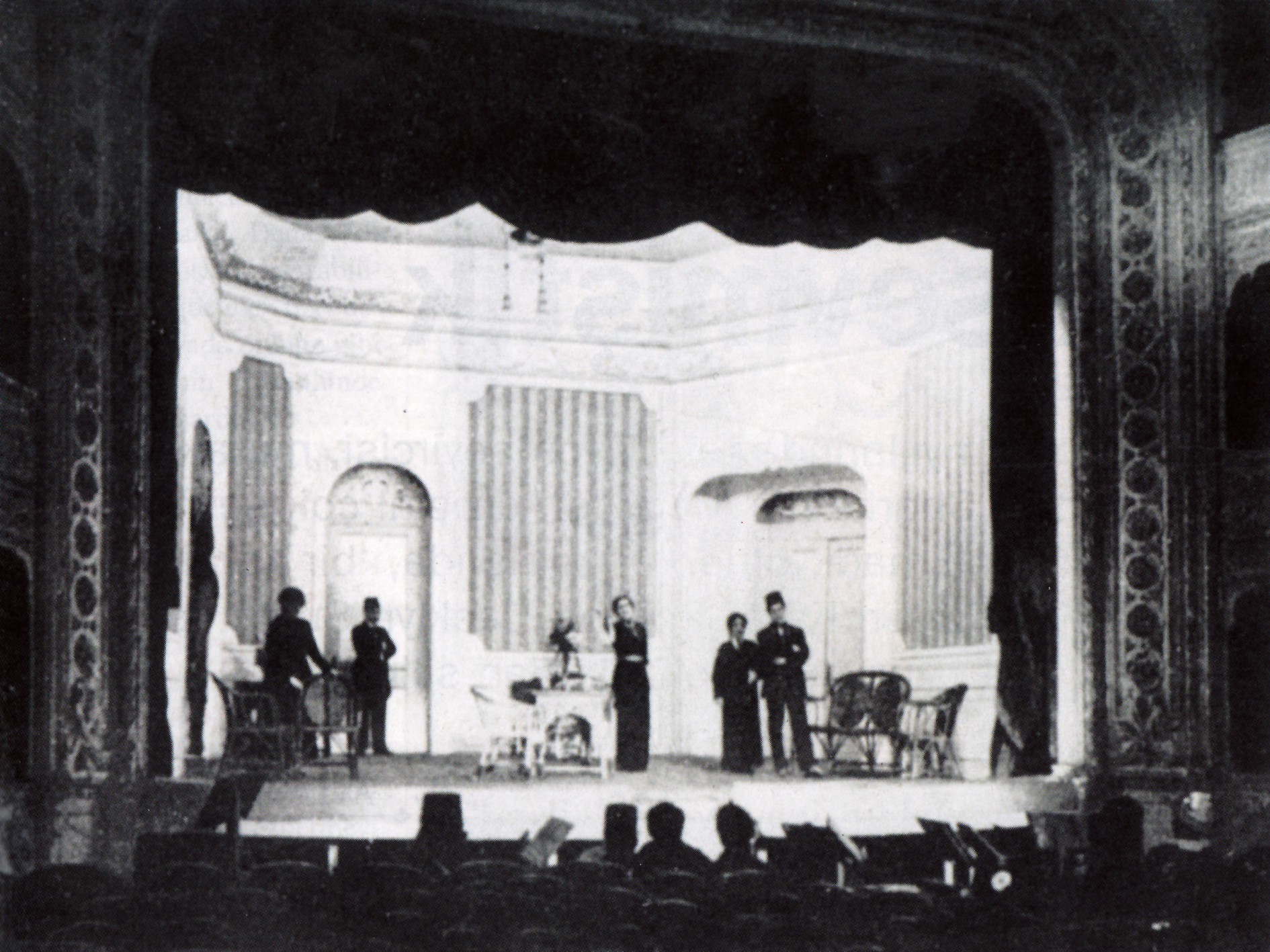 Darülbedayi’nin sahnelediği ilk oyun olan “Çürük Temel”, Tepebaşı Sahnesi.